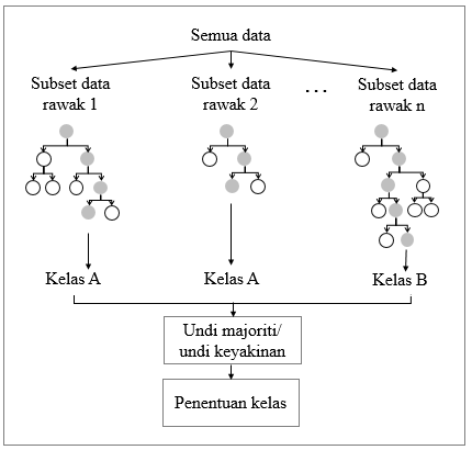 Contoh model pengelasan Hutan Rawak